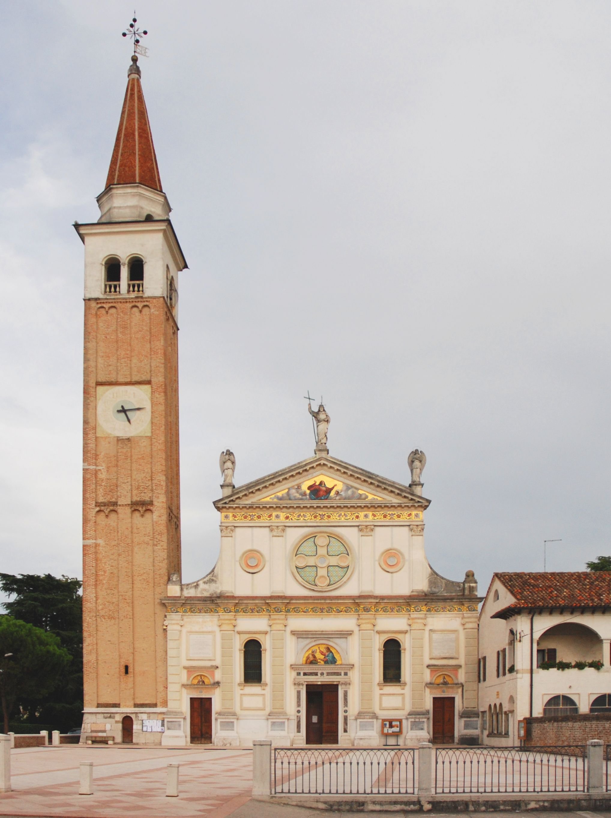 Chiesa di Santa Maria Assunta di Mogliano Veneto